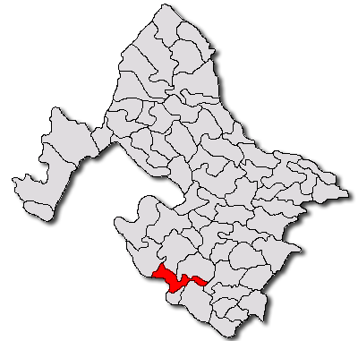 Categorie:Hărţi ale judeţului Mehedinţi